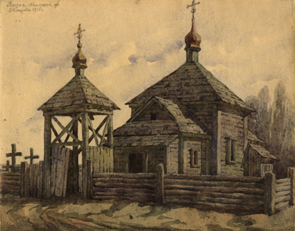 Беларуская (тарашкевіца): Вызна (Vyzna). Капліца